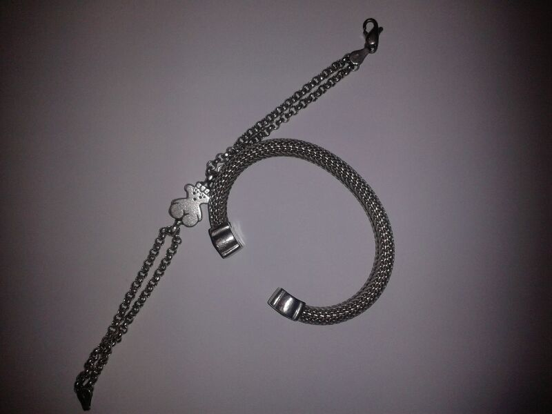 Són braçalets propis per a una entrada en Viquipèdia